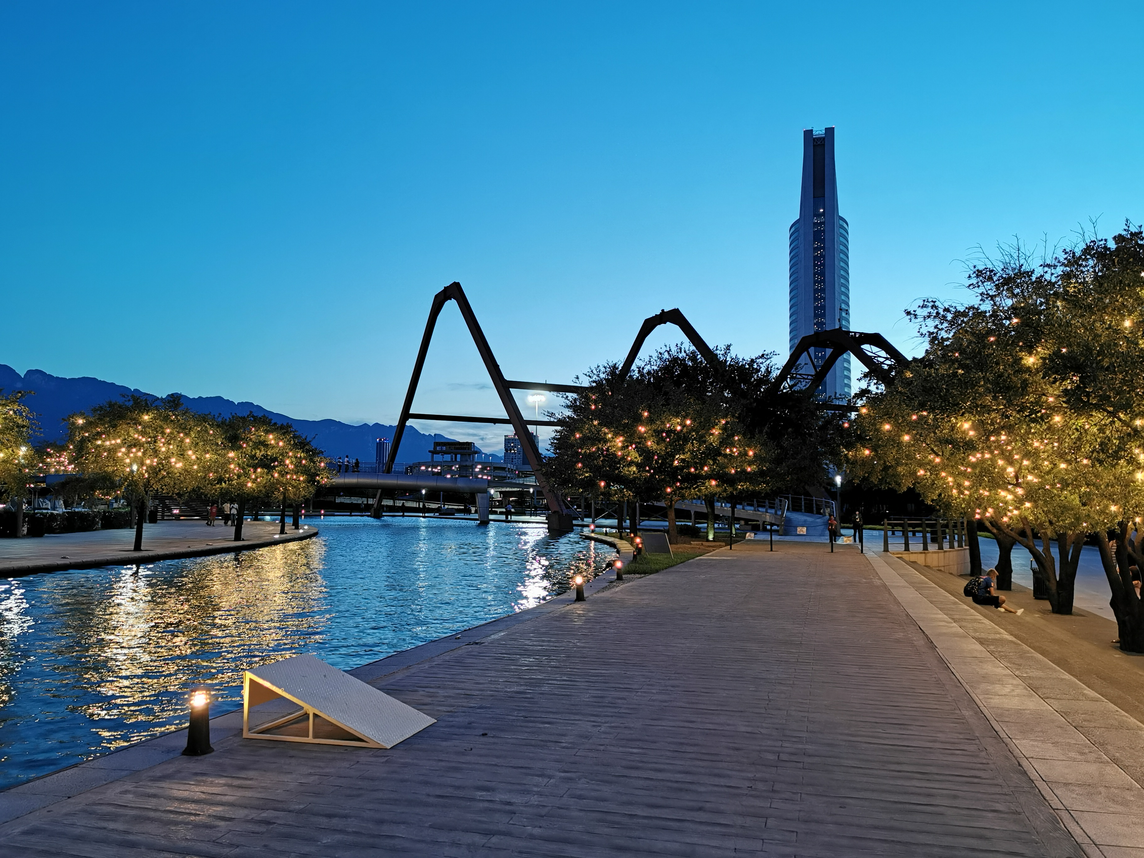 Vista nocturna del paseo Santa Lucia.